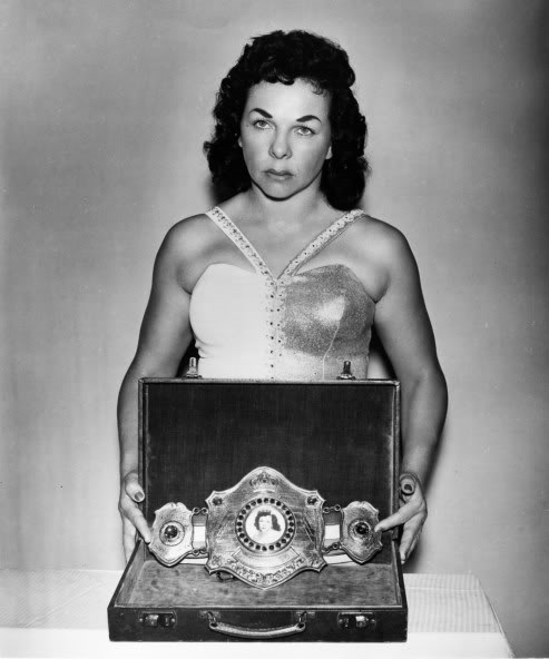 Portrait des Mongols dans un programme de catch Heavyweight Wrestling du 31 août 1970